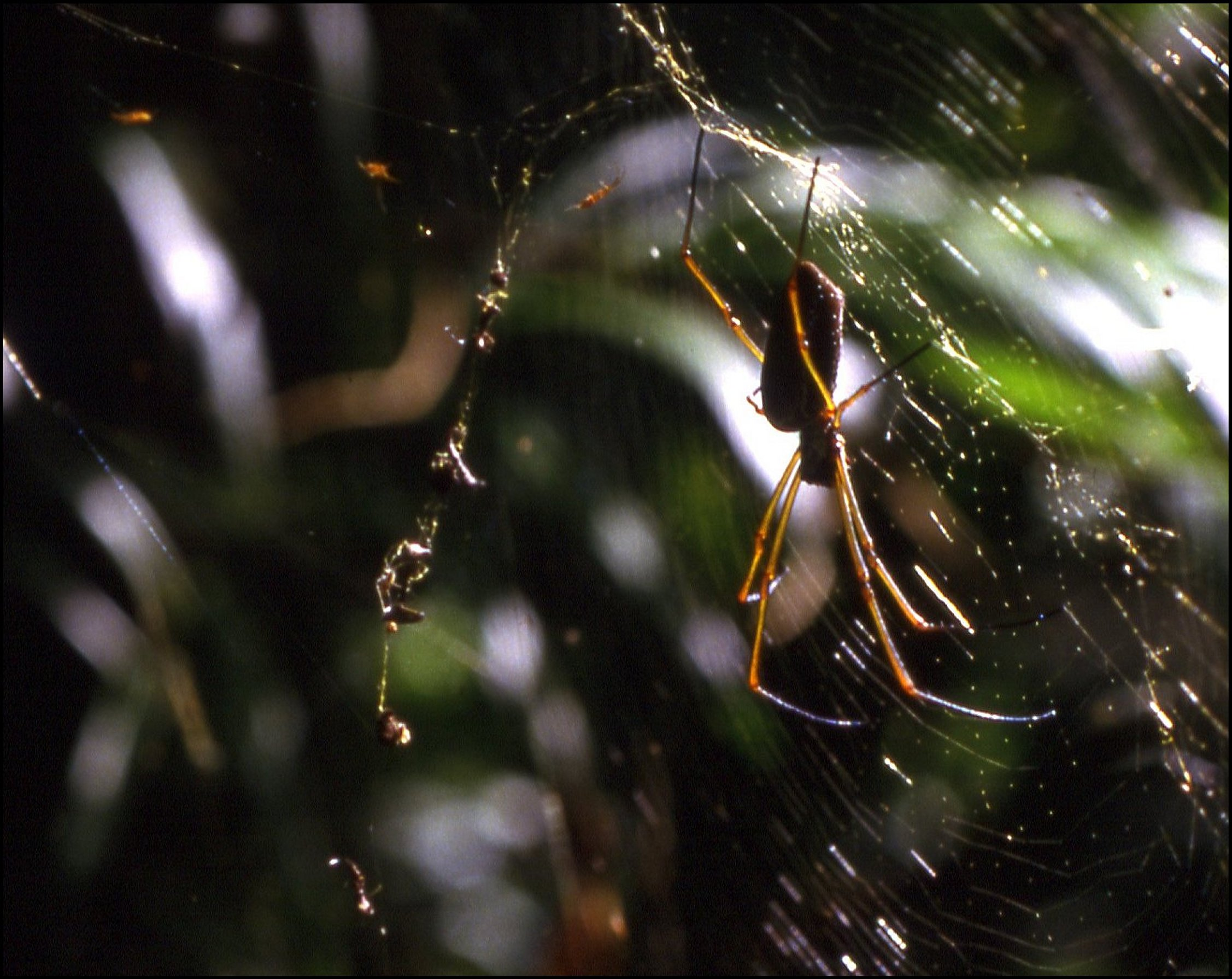 Femelle de Nephila clavipes sur sa toile avec des kleptoparasites.